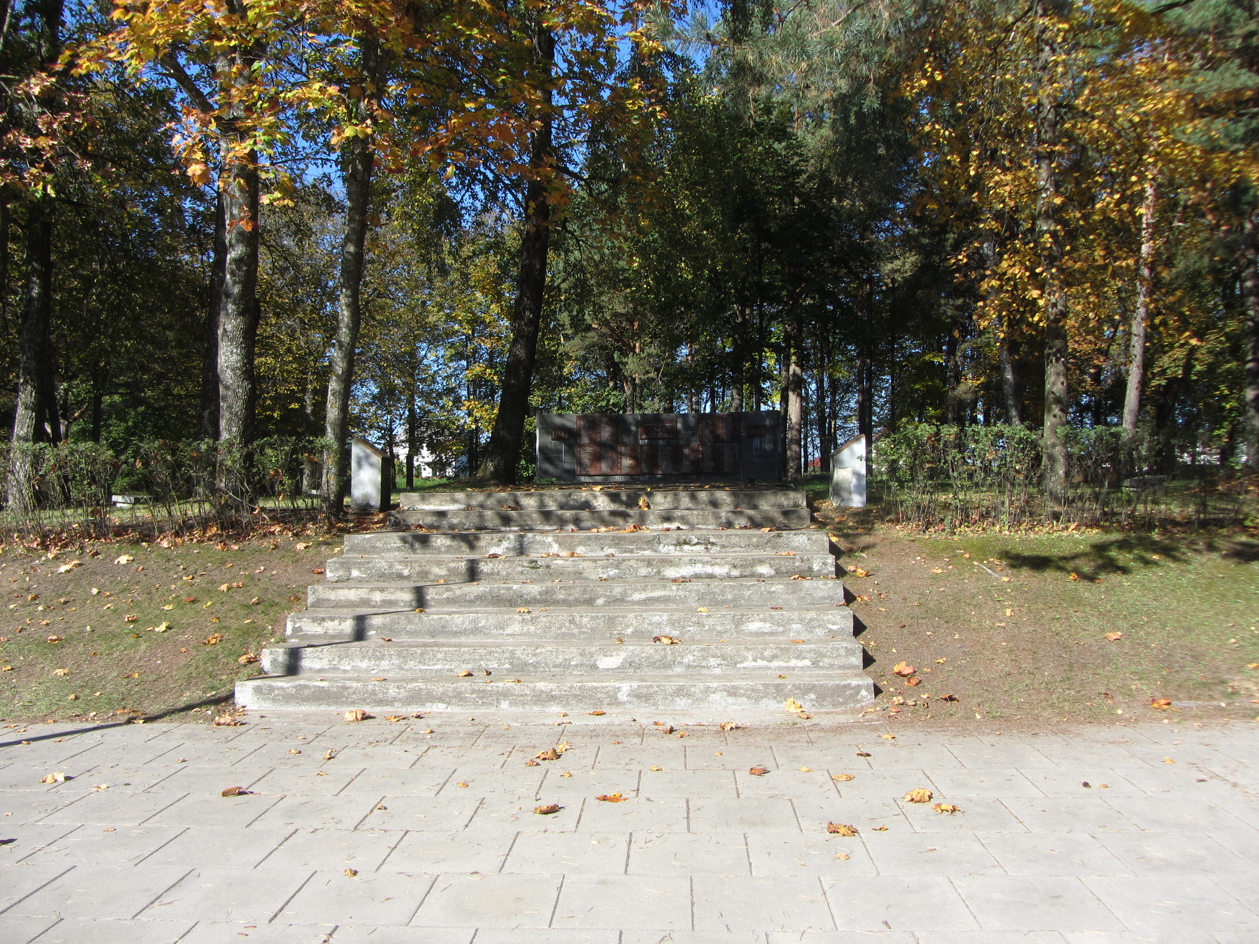 Cirkliškis, Lithuania